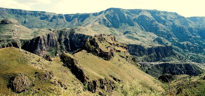 თმოგვის ციხე